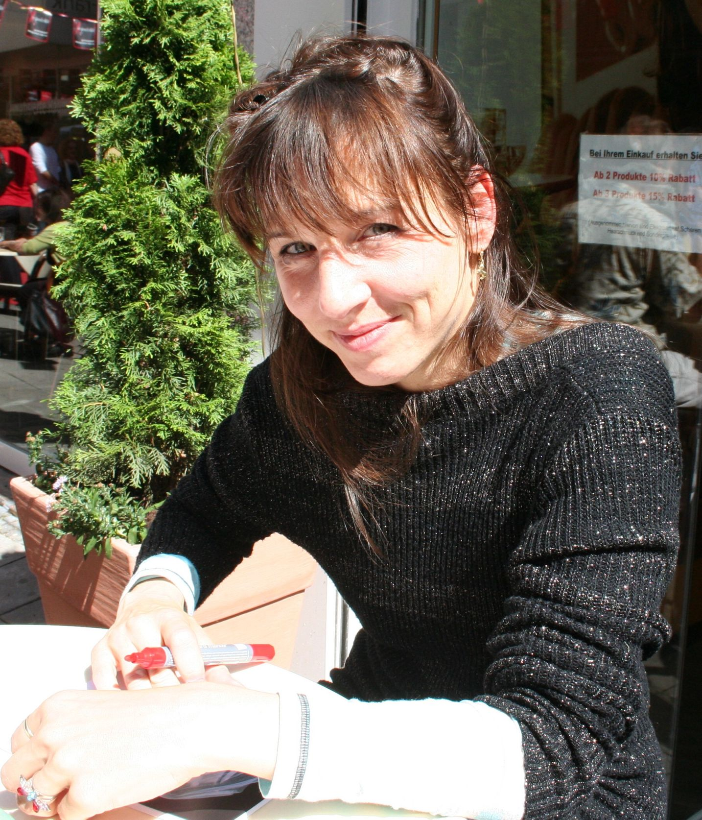 Meret Becker bei einer Autogrammstunde im Rahmen der Nibelungenfestspiele in der Wormser Hafergasse (Fußgängerzone)